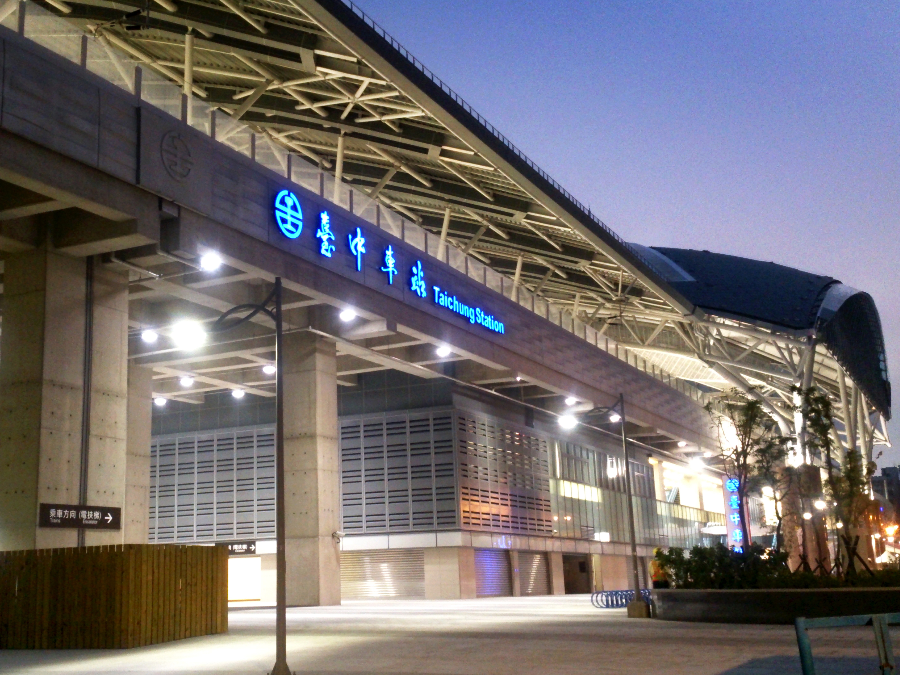 2016年10月16日上午，台中車站的新站體第一階段啟用。